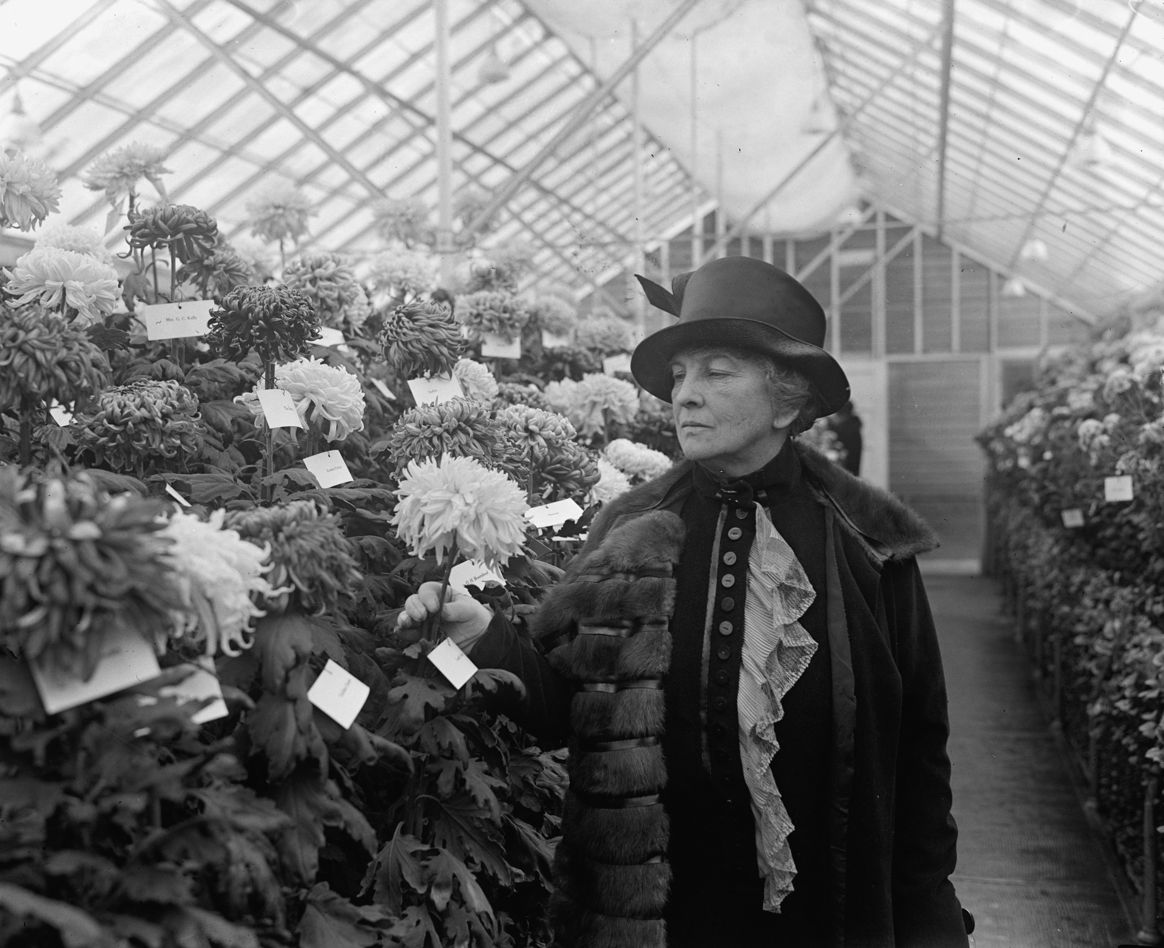 Mrs. Frank B. Kellogg, 11/5/25